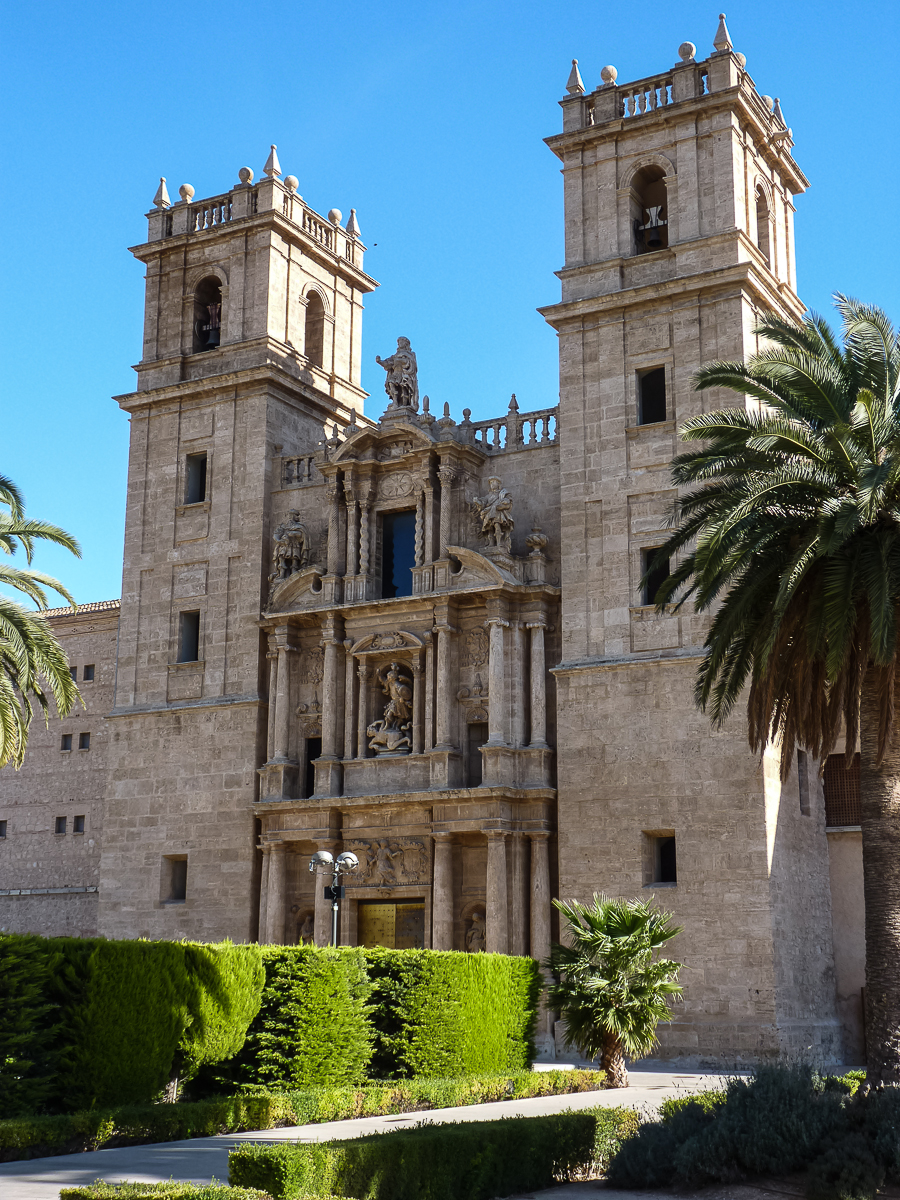 CONVENTO DE SAN MIGUEL DE LOS REYES DE VALENCIA 06122009 130104 00063.jpg